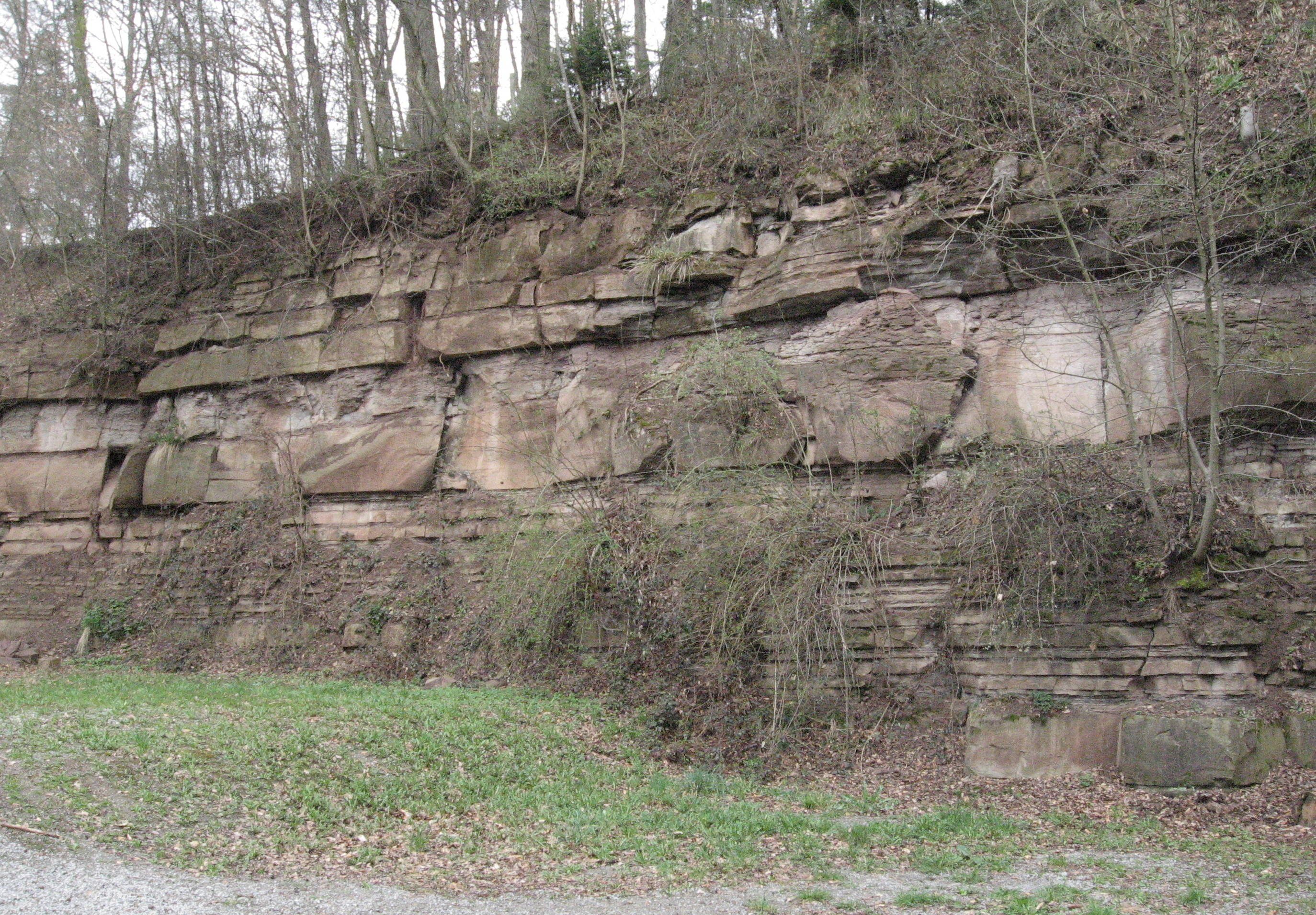 Aufgelassener Schilfsandstein -Bruch etwa 400 m N der Ortsmitte von Bühlerzell am SW-Fuß des Eichelbergs.